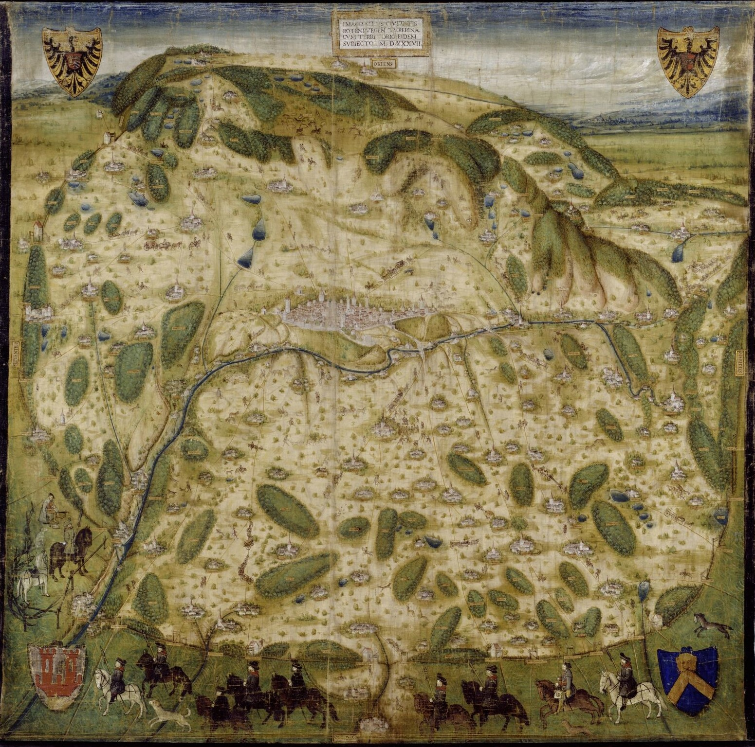 Gebiet (Landwehr) mit Dörfern der Freien Reichsstadt Rothenburg ob der Tauber. Karte von Wilhelm Ziegler, 1537.